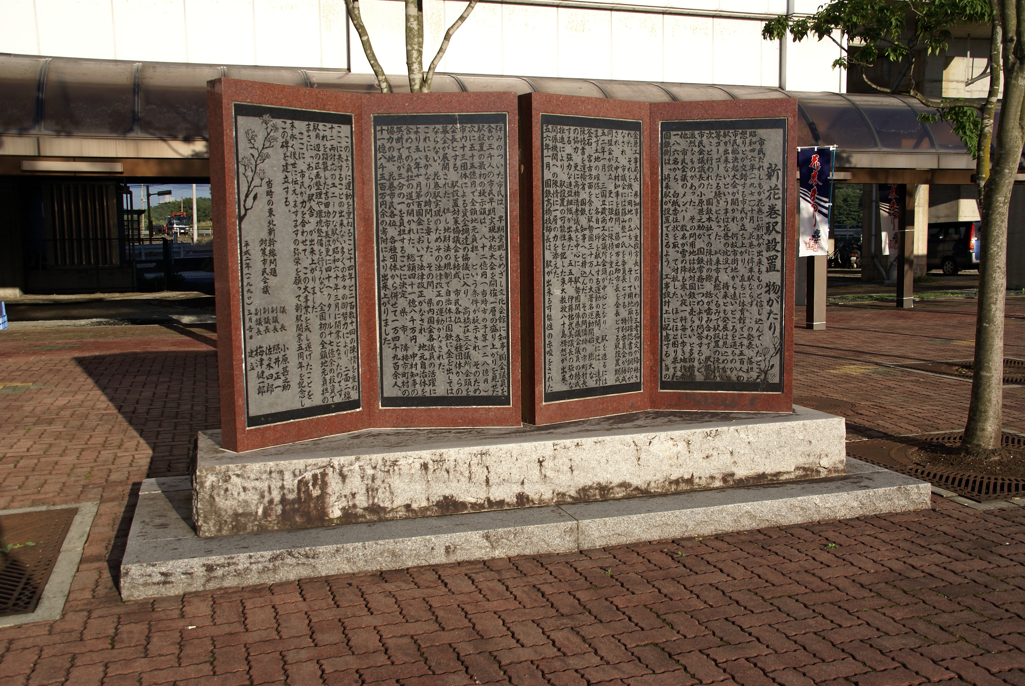 Shin-Hanamaki Station in Hanamaki, Iwate prefecture, Japan